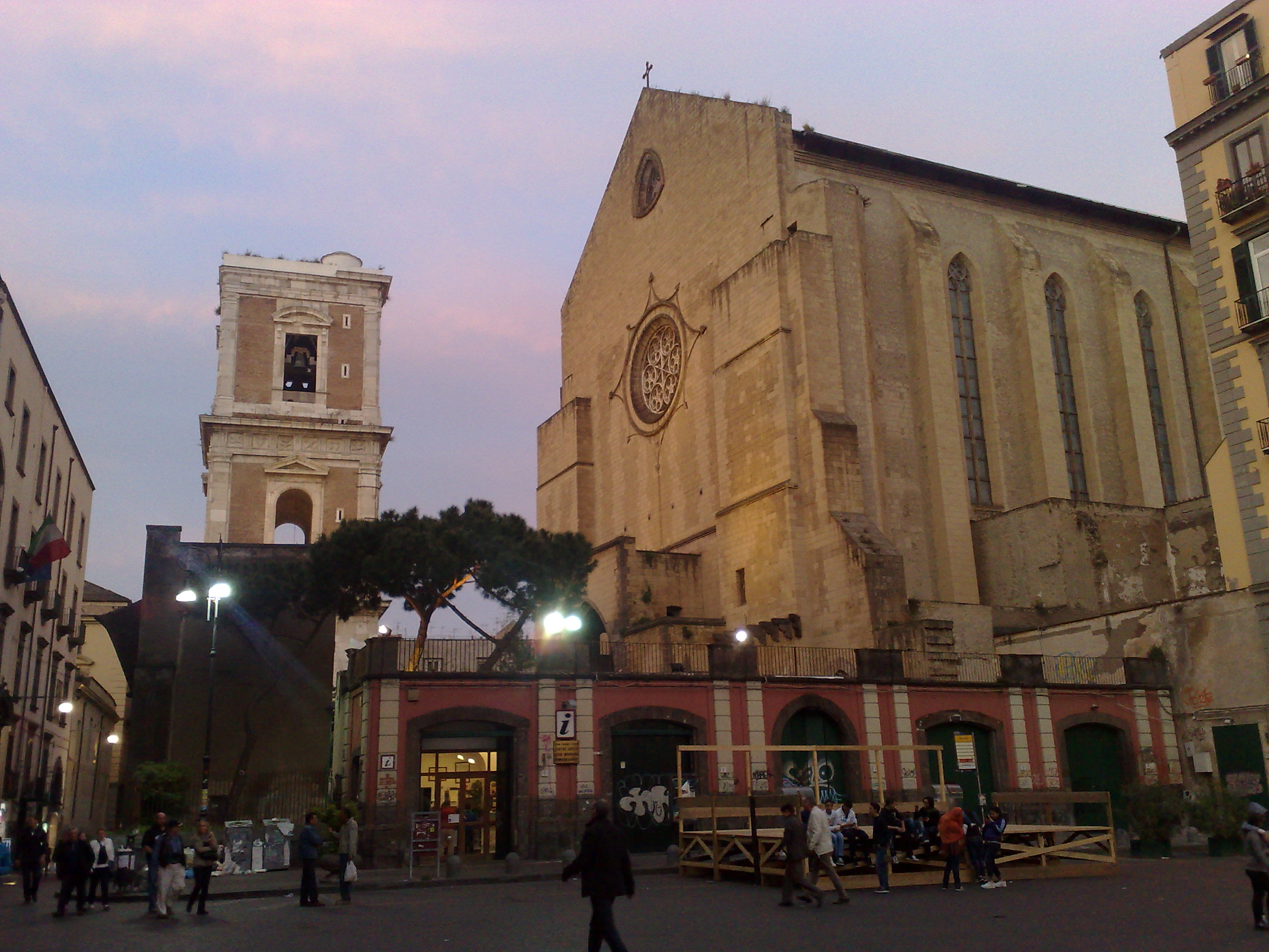 Monastero di Santa Chiara visto da Piazza del Gesù (Napoli)